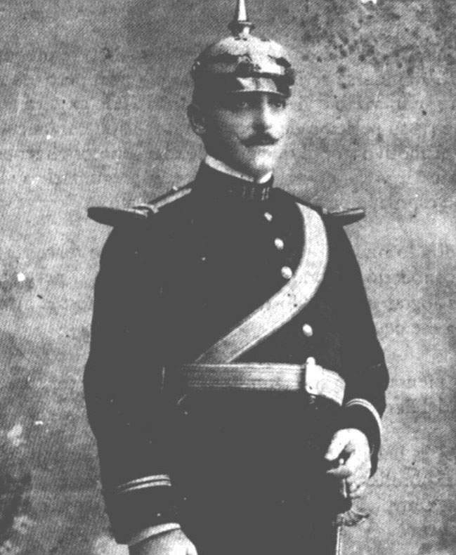 Fotografía Histórica de Ramón Arnaud en la Armada de México